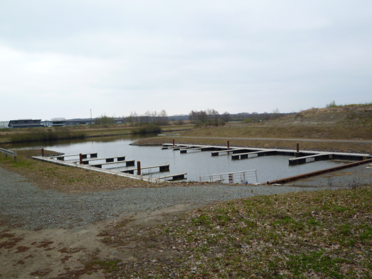 Sportboothafen im Bau 2012